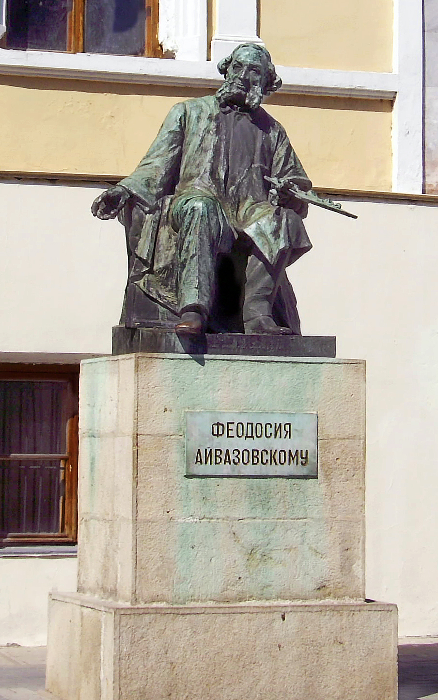 Феодосия. Пам'ятник І. К. Айвазовському.